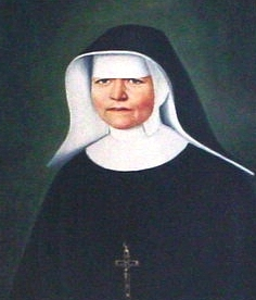 Schwester Ulrika Nisch, geboren in Mittelbiberach. Eigenes Foto eines Gemäldes, das in der Kirche St. Martin in Biberach an der Riß hängt. Fotografiert von The weaver 00:58, 26. Mai 2004 (CEST), unter GNU-FDL zur Verfügung gestellt von Weberberg.de, der Website für Biberach.